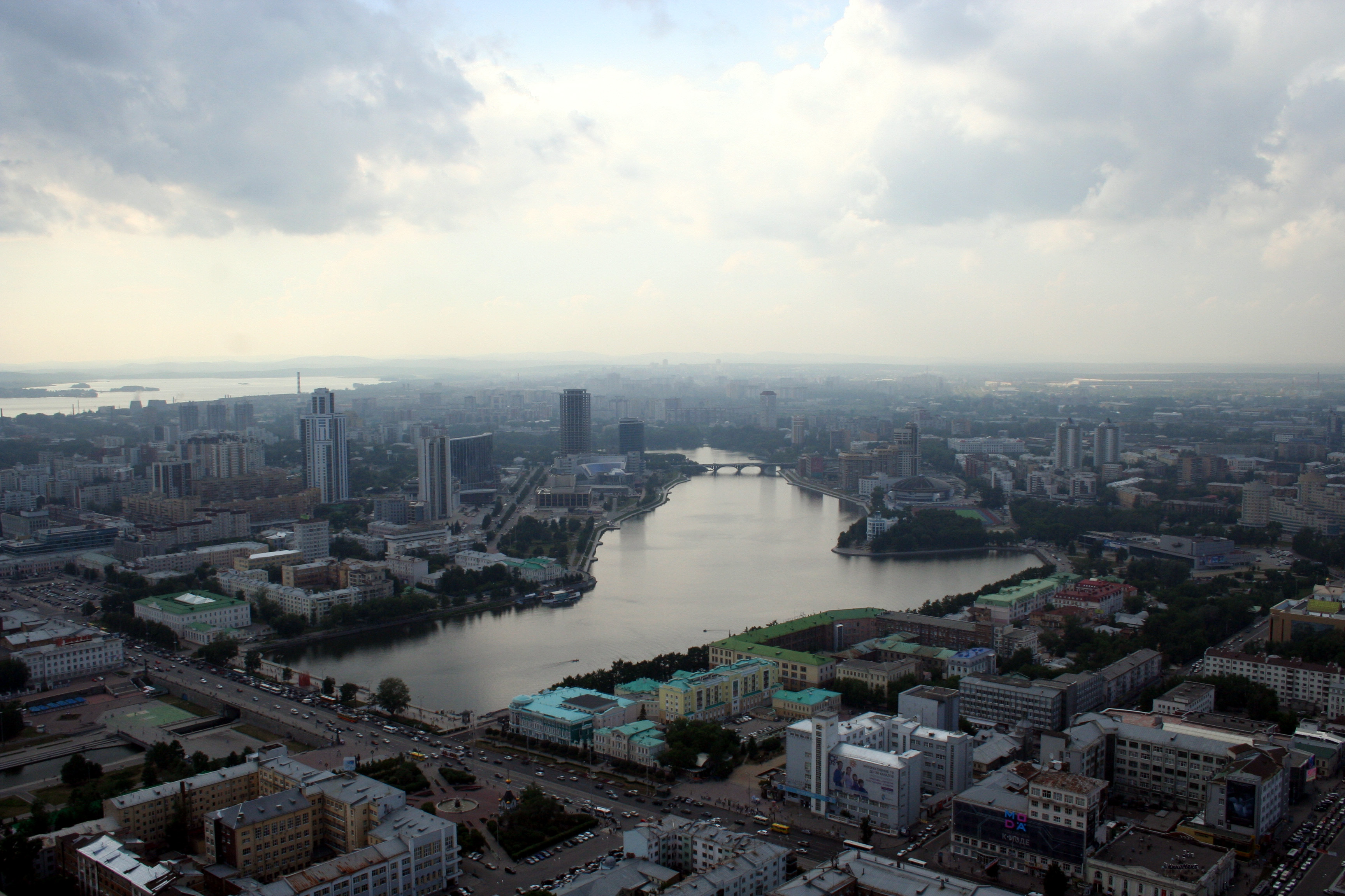 Городской пруд Егатеринбурга